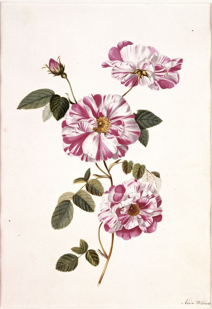 Franse roos (Rosa gallica L. 'versicolor'